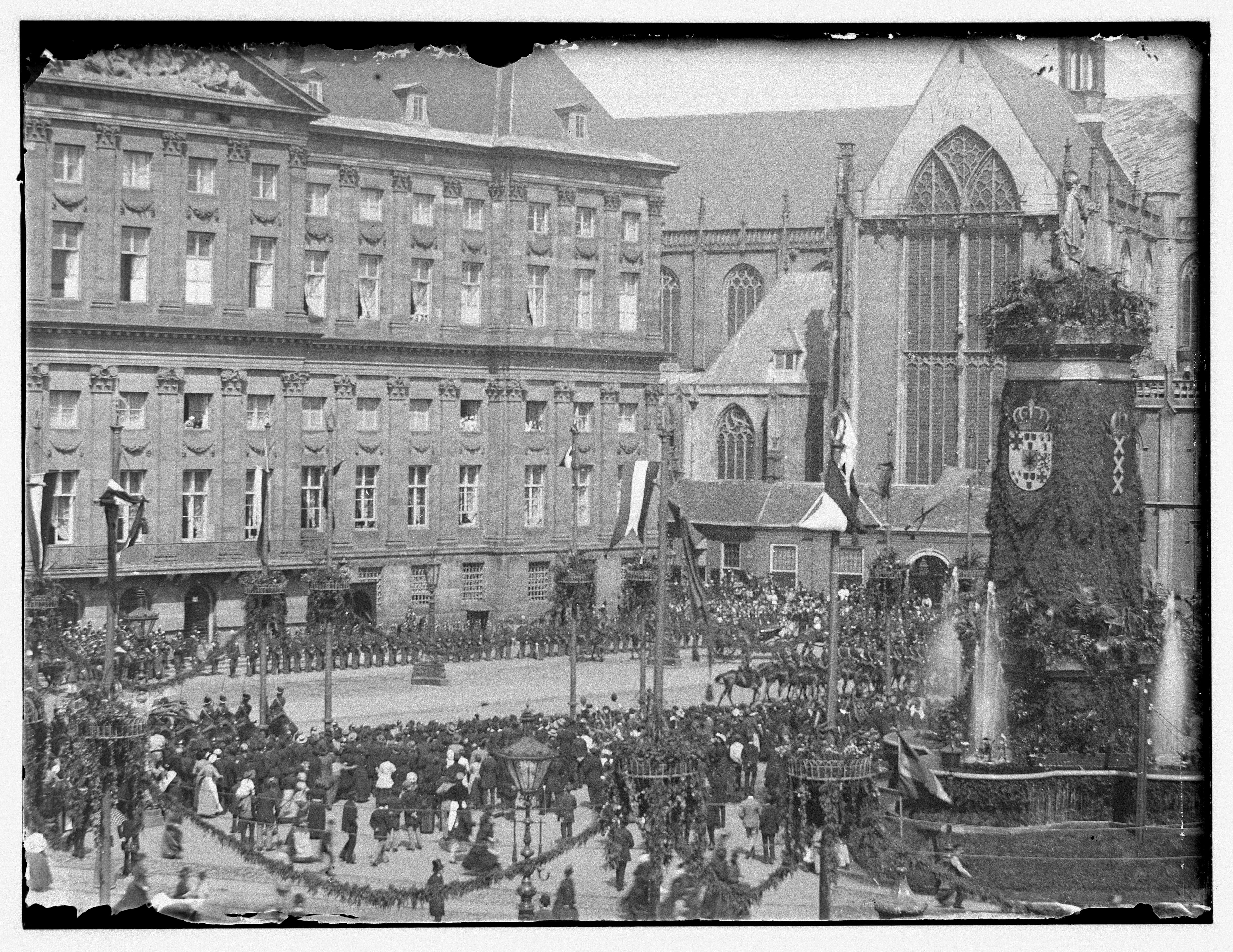 Beschrijving Dam``, noordwestzijde Gezien naar Koninklijk Paleis en Nieuwe Kerk. Rechts het beeld 'Naatje van de Dam'``, tijdens bezoek Keizer Wilhelm II van Duitsland. Documenttype foto Vervaardiger Olie``, Jacob (1834-1905) Collectie Collectie Jacob Olie Jbz. Datering 1 juli 1891 t/m 3 juli 1891 Geografische naam Dam Inventarissen Afbeeldingsbestand 010019000335 Generated with Dememorixer